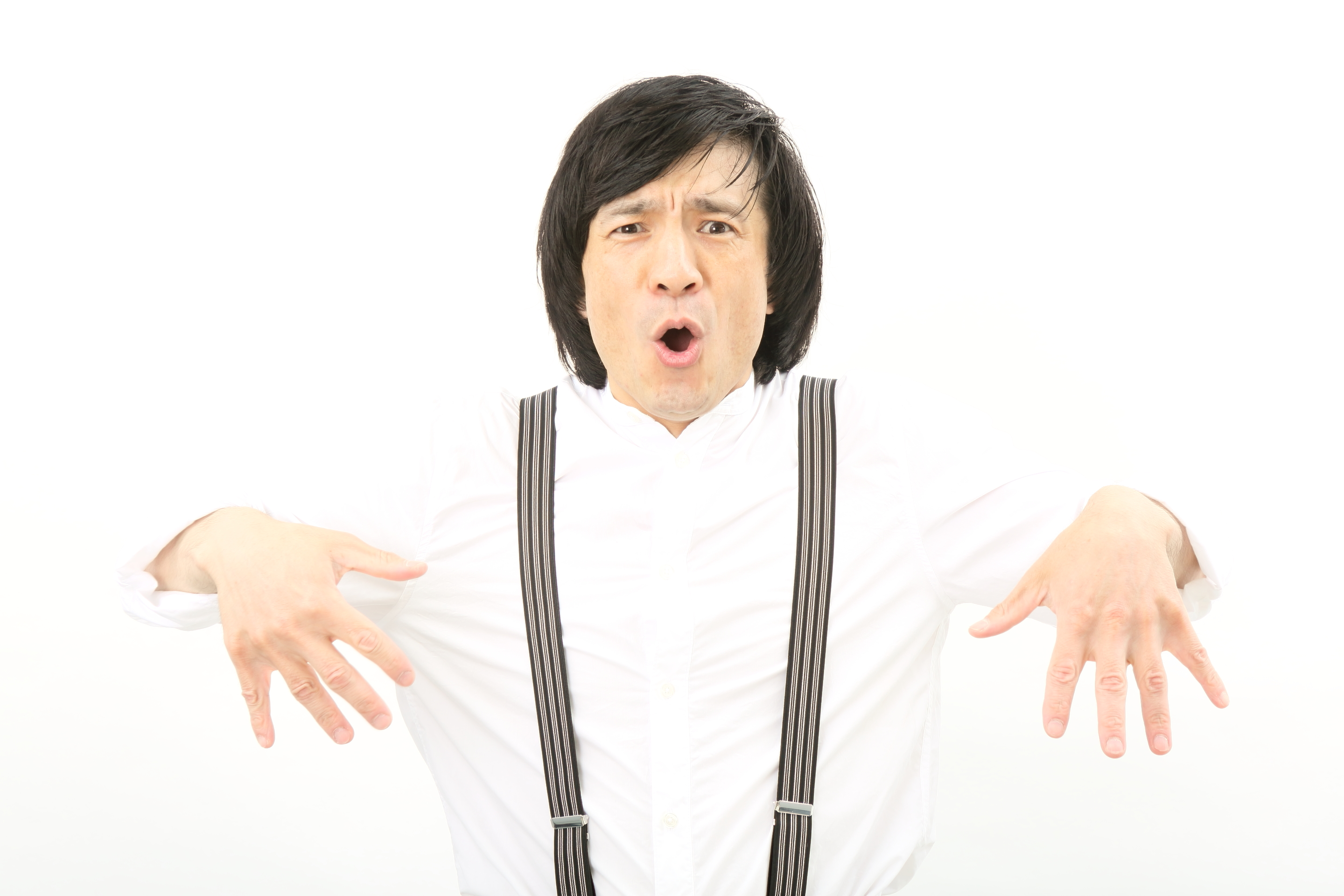 映画『プロジェクトA』の扮装